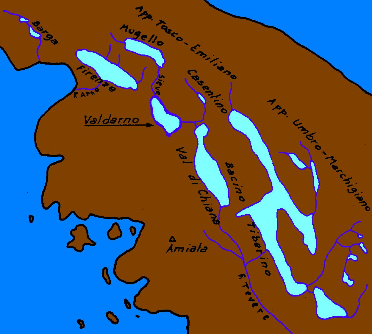 Toscana 2 milioni di anni fa